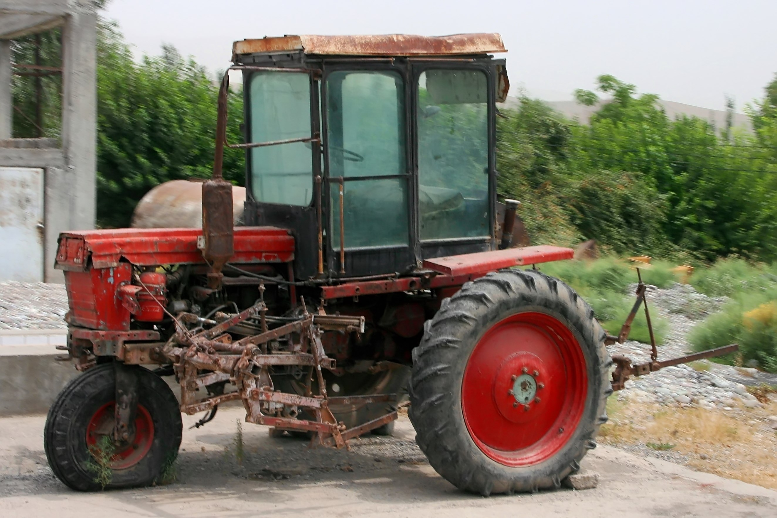 Ein T-28-Traktor für den Baumwollanbau in Tadschkistan.